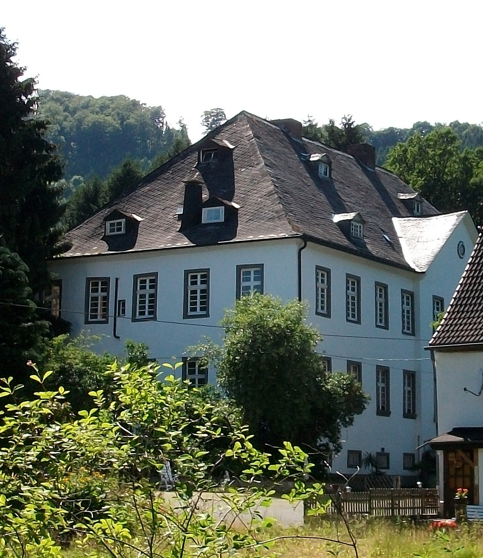 Haus Blessenohl, Eslohe (Germany)